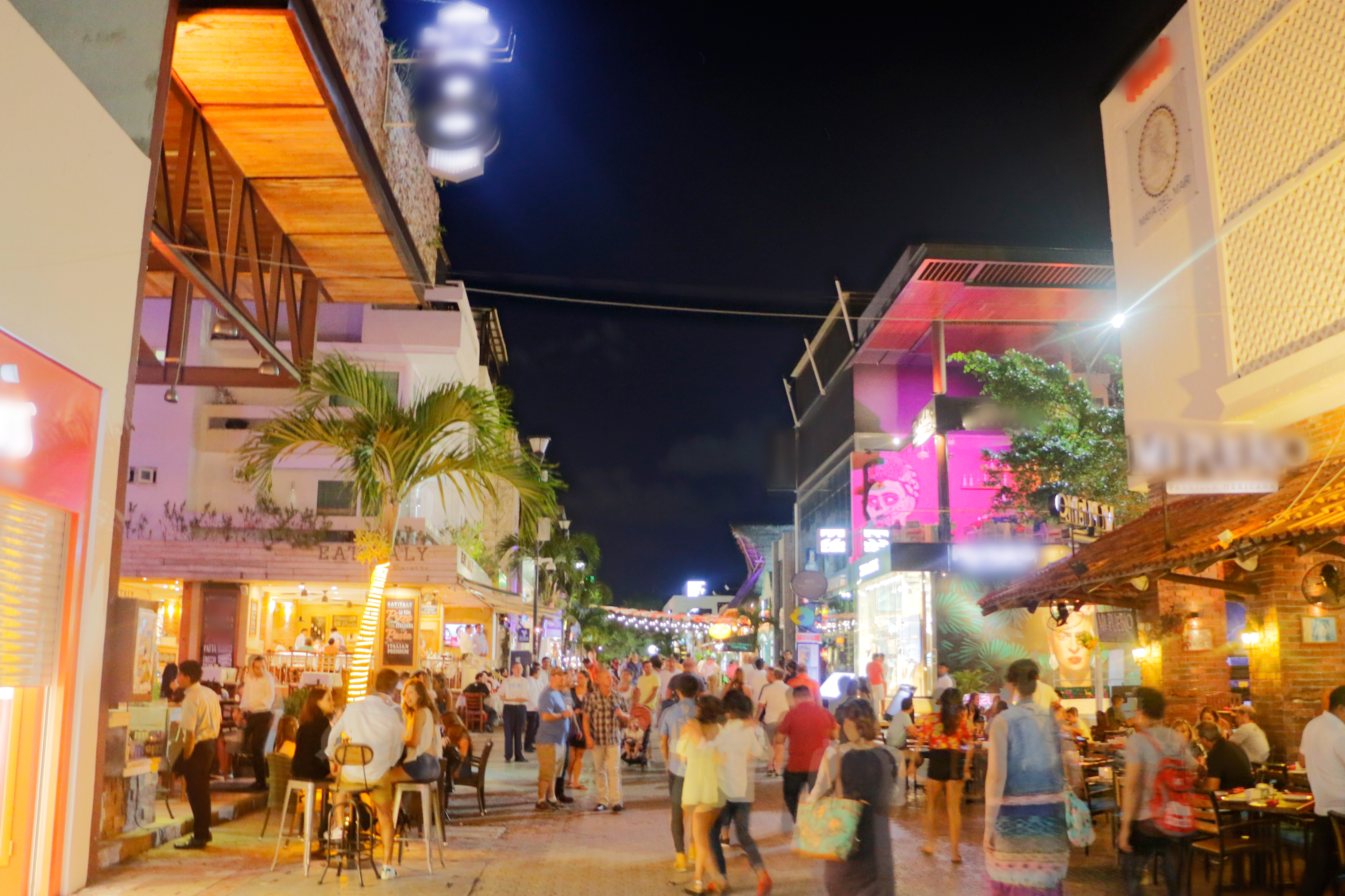 Foto tomada el 2018 sobre la Quinta Avenida Playa del Carmen